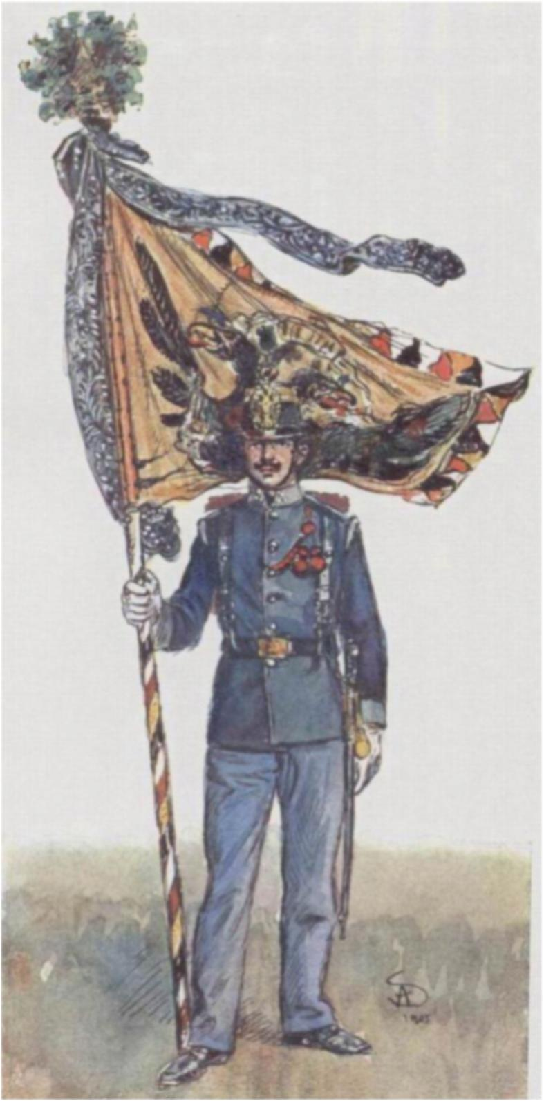 Fahnenträger k.u.k. Infanterie